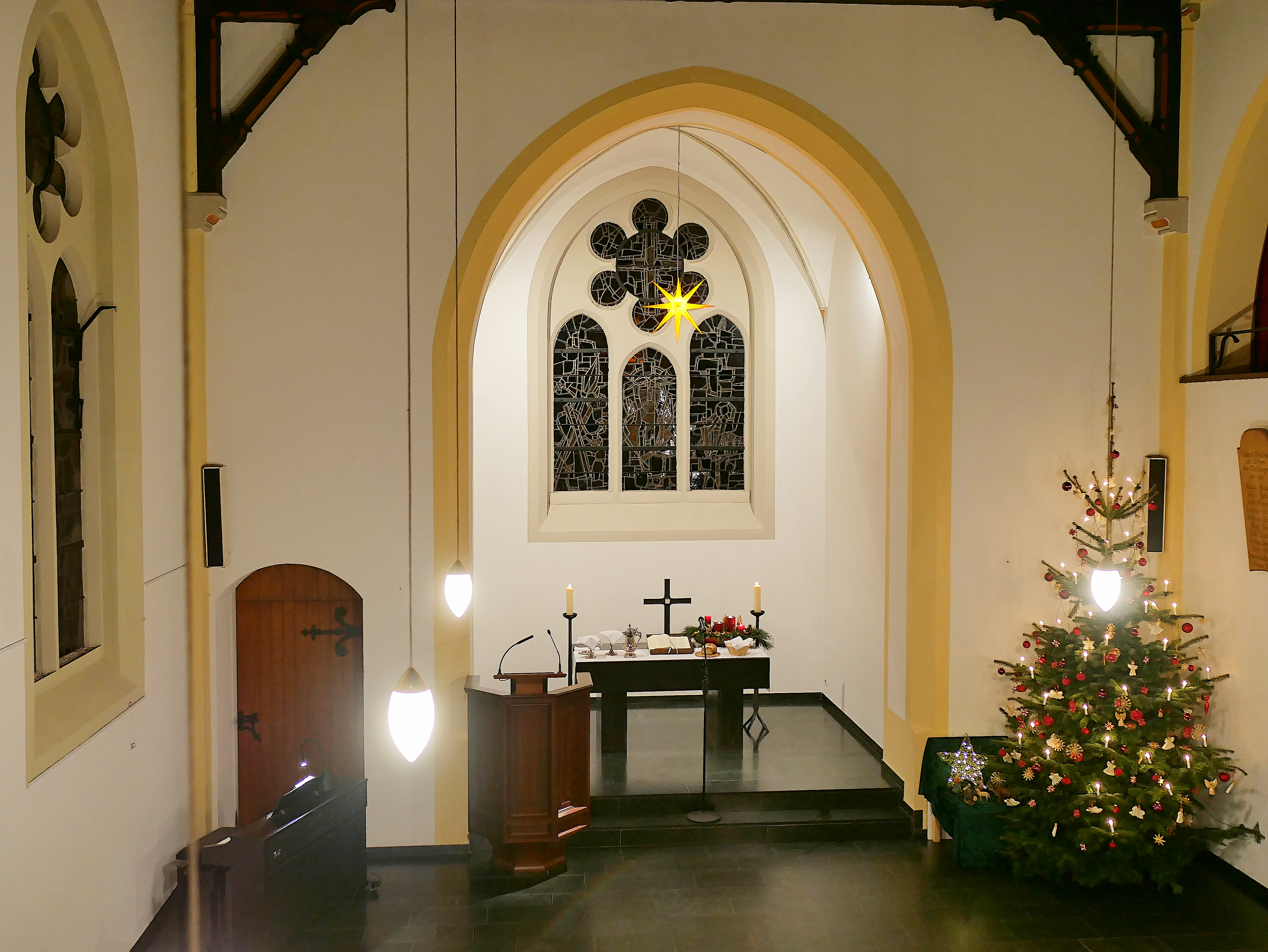 Evangelische Kirche Konz-Karthaus im Weihnachtsschmuck Silverster 2018